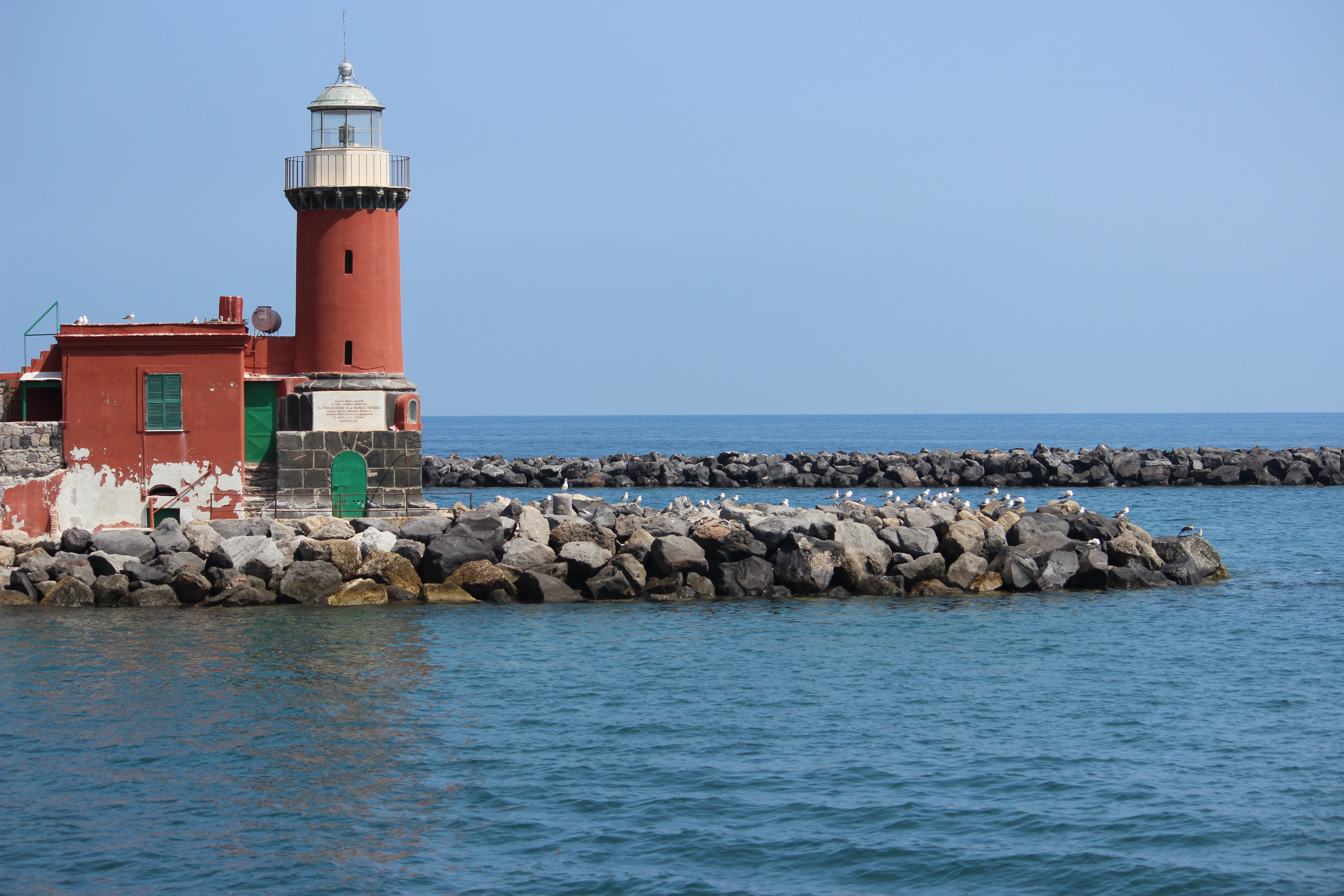 Ischia Porto desde el mar. Faro.